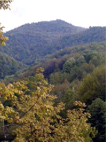 Kocaeli Kartepe Dağı